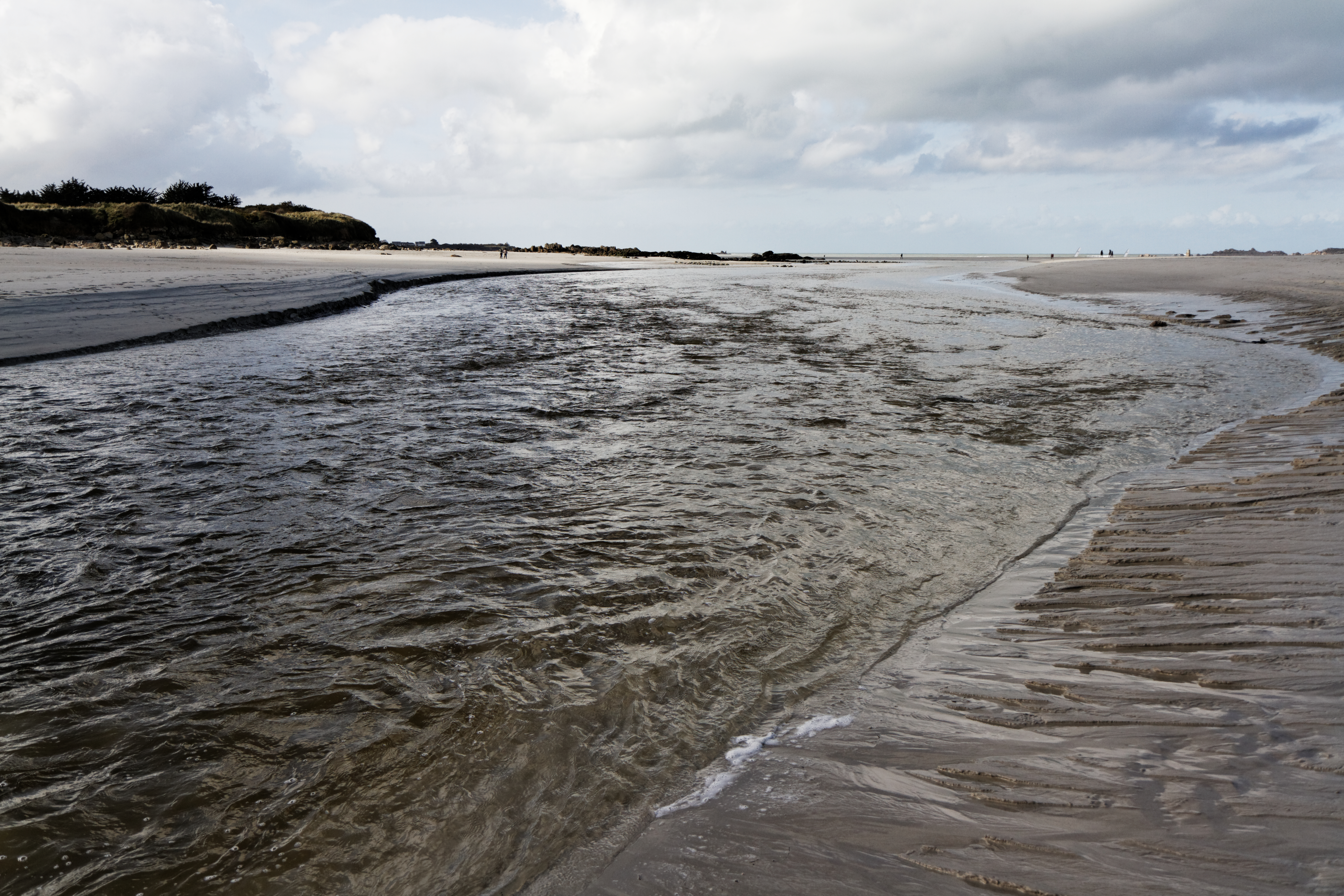 L'Horn à son embouchure du côté de la plage du Dossen à Santec dans le Finistère.